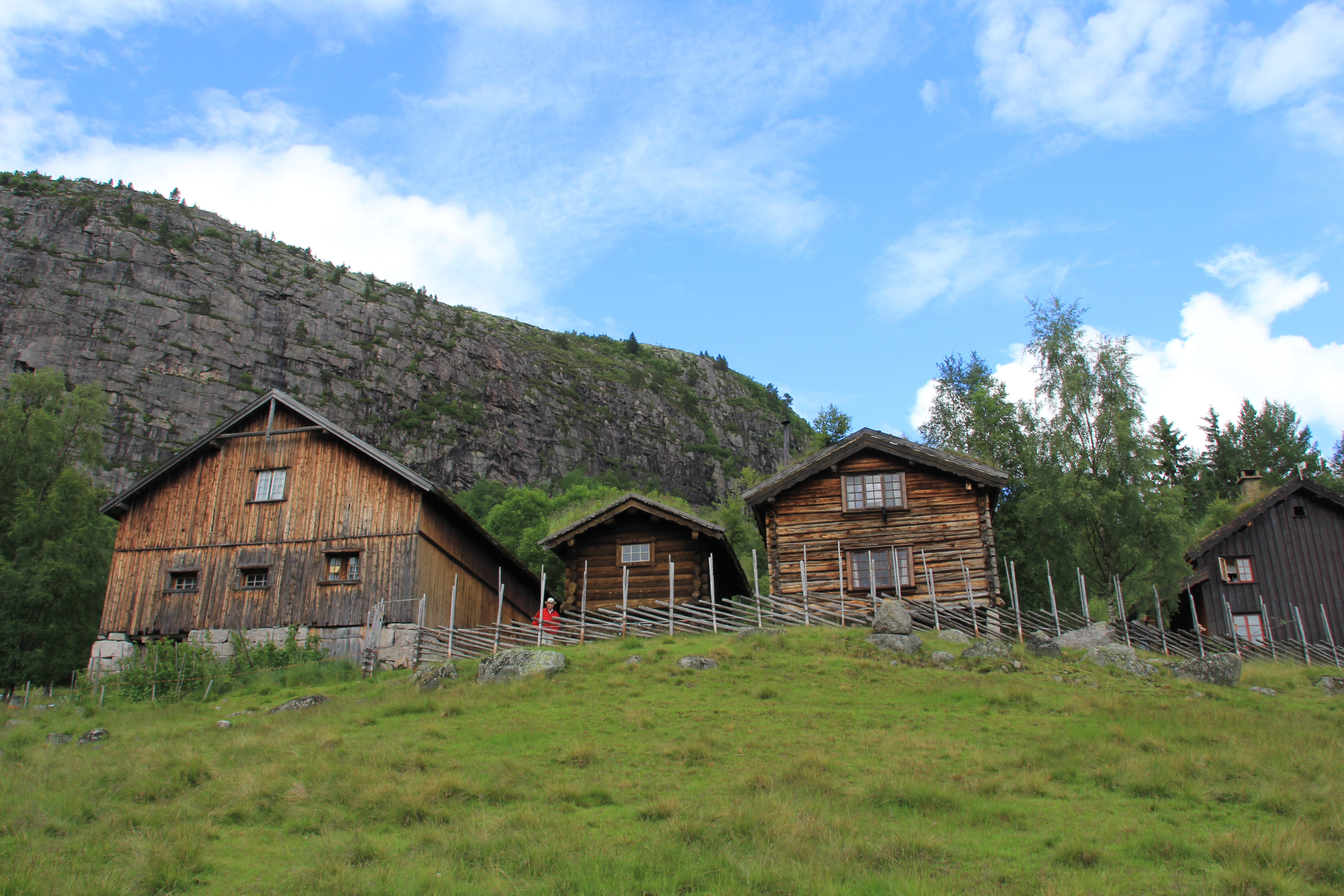 Kvipt er en gammel gård i Birtedalen i Fyresdal, Telemark.